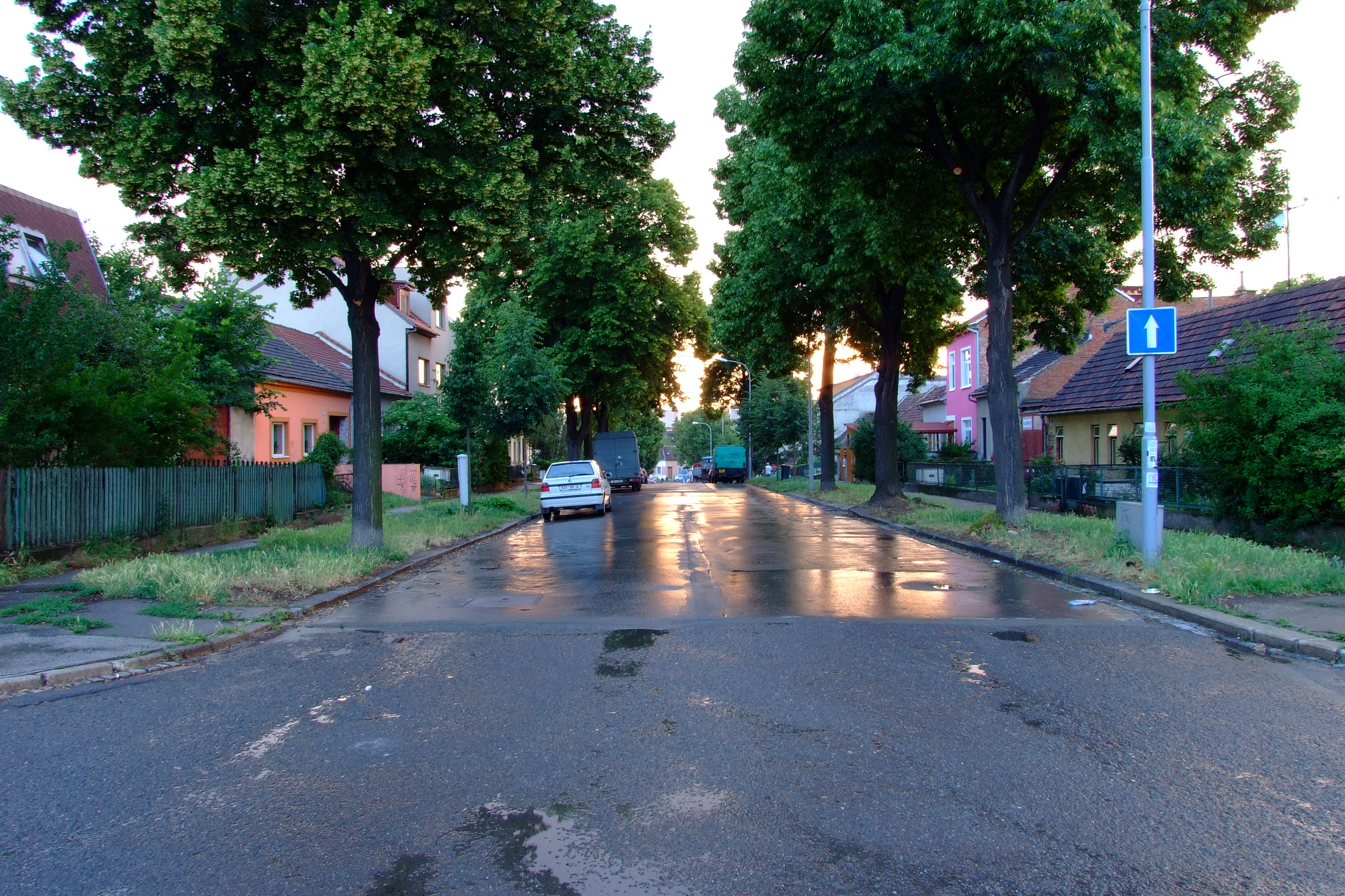 Brno-Juliánov - západní část Vančurovy ulice, vyfotografovaná z Gajdošovy ulice